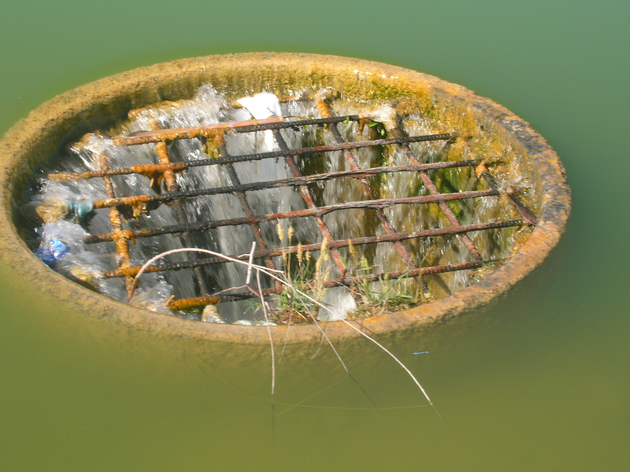 Odpływ do kanalizacji deszczowej. Zalana uliczna krata ściekowa.